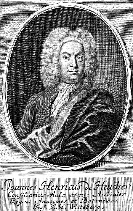 Kupferstich - Johann Heinrich von Heucher (1677-1746) deutscher Naturwissenschaftler, Leibarzt von August dem Starken, Museumsdirektor und Namensgeber der Pflanzengattung Heuchera.